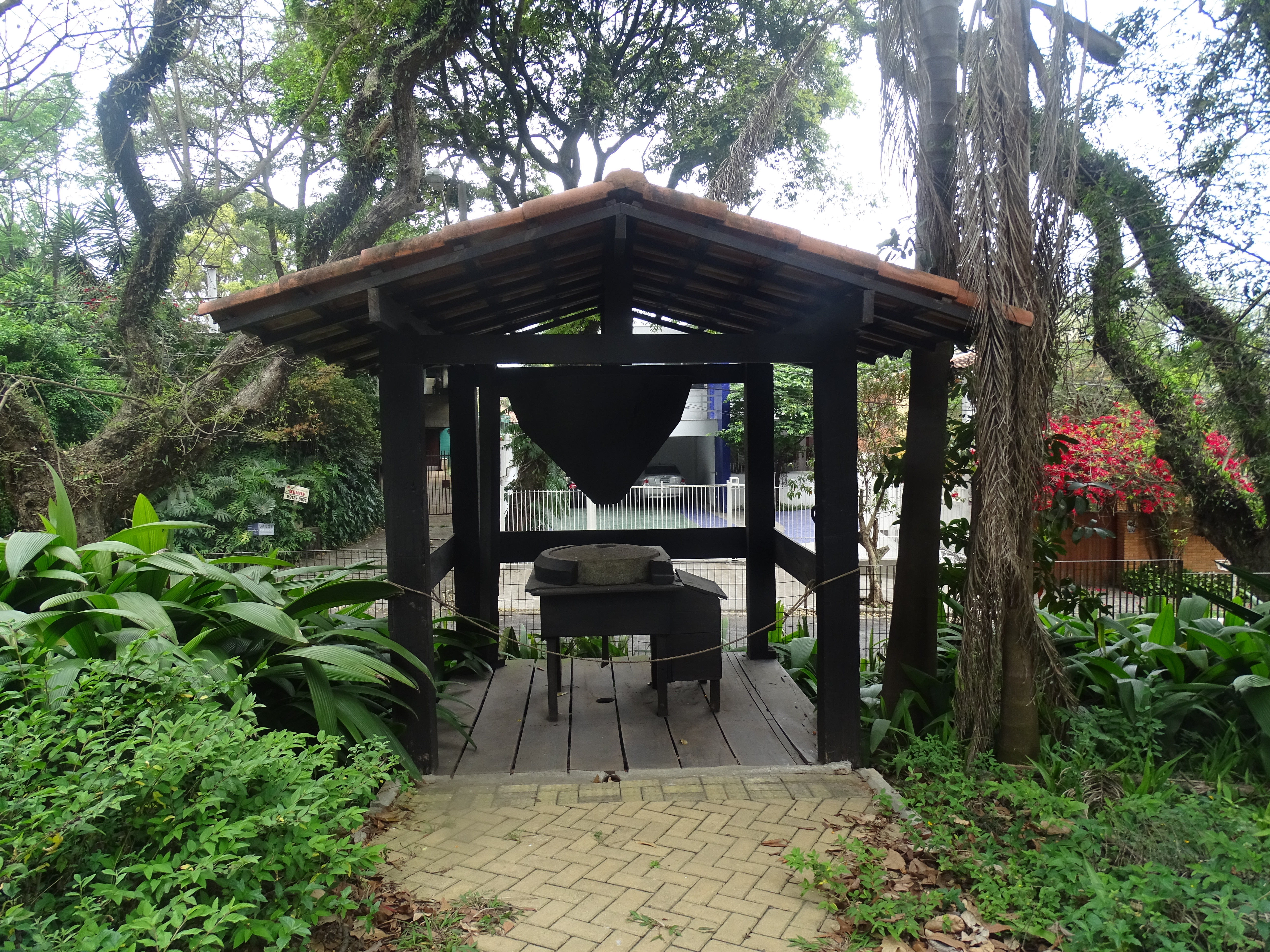 Com essa máquina, a família tinha facilidade em moer o milho. O milho moído saia pelo lado, enquanto seu resto caia na parte de baixo.